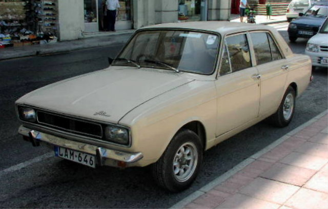 Hillman Hunter Sedan